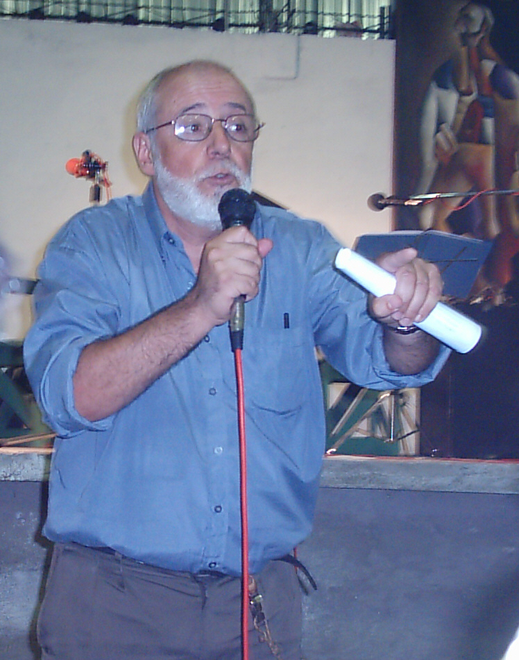 Fotografía del historiador uruguayo Gonzalo Abella.